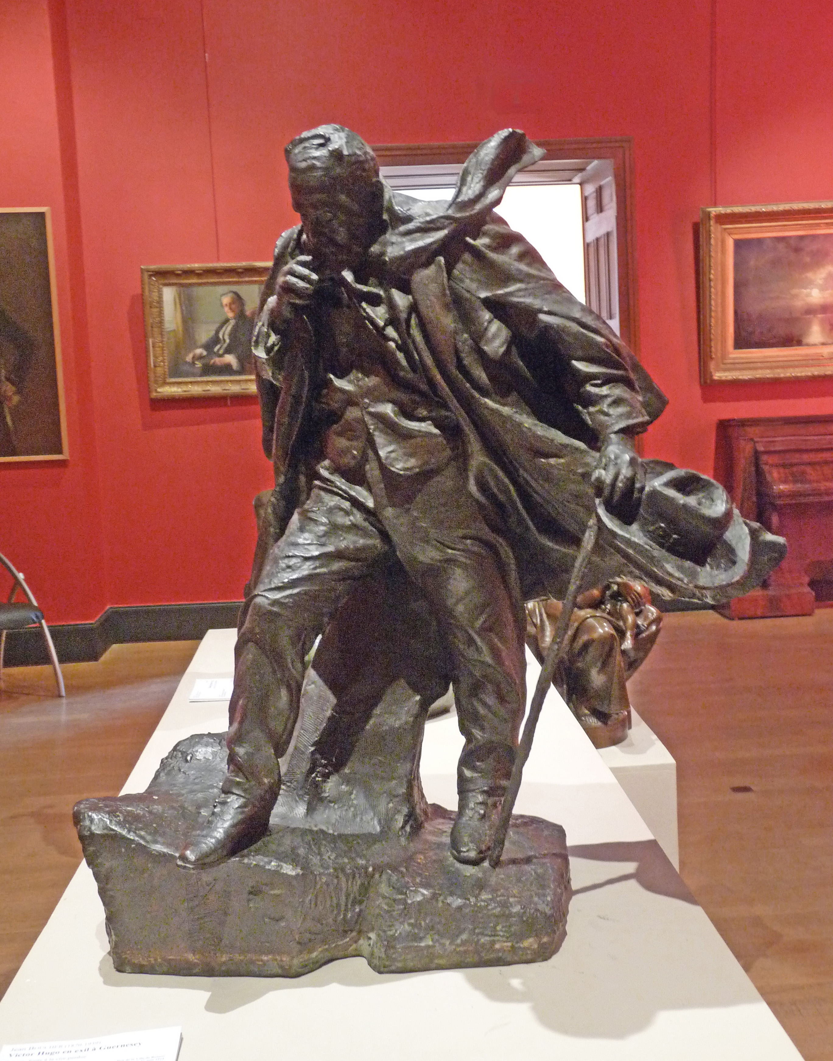 Jean Boucher, Victor Hugo en exil à Guernesey. Bronze. Fonte à la cire perdue. Vers 1880. Don de la ville de Rennes à Raymond Poincaré en 1914 (legs Raymond Poincaré 1936). Musée barrois.